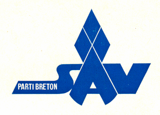 Logo du Parti Strollad Ar Vro SAV en bleu avec le A en hermine "Parti Breton" sur fond bleu